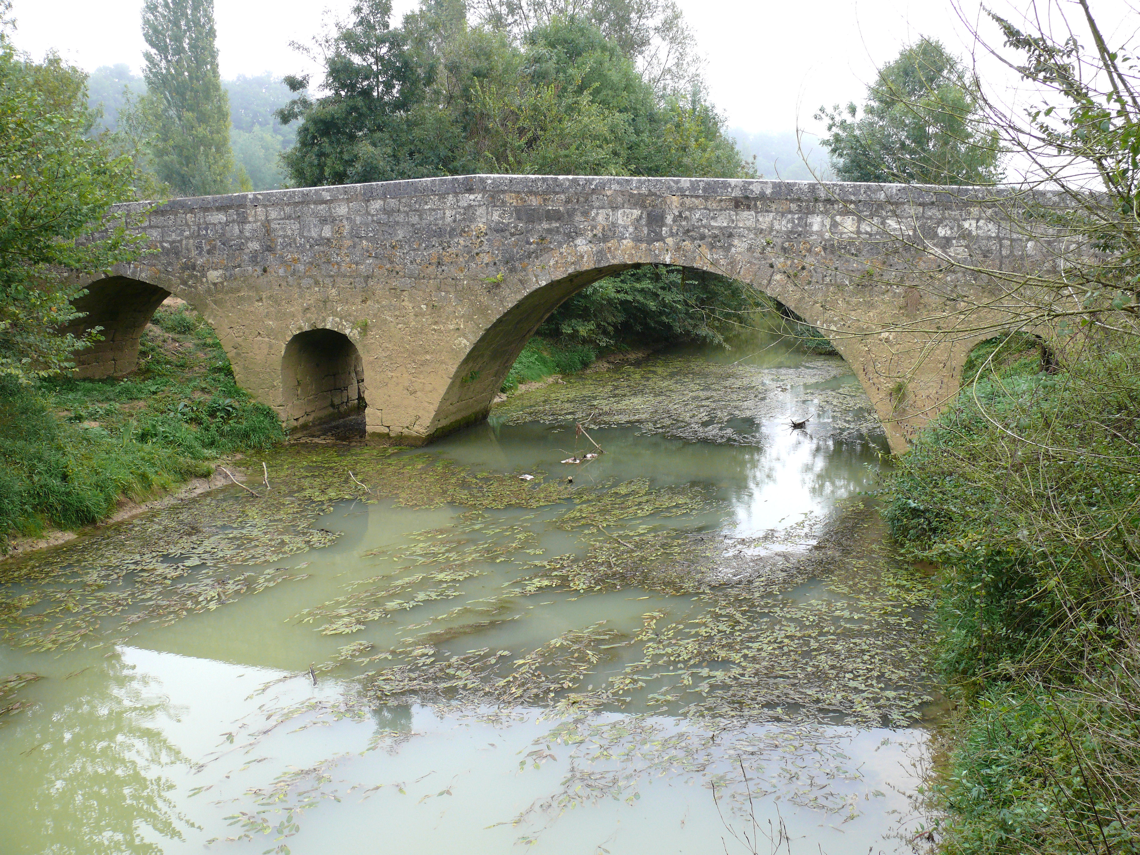 Vopillon (Gers) - Pont de l'Artigue vu de l'aval